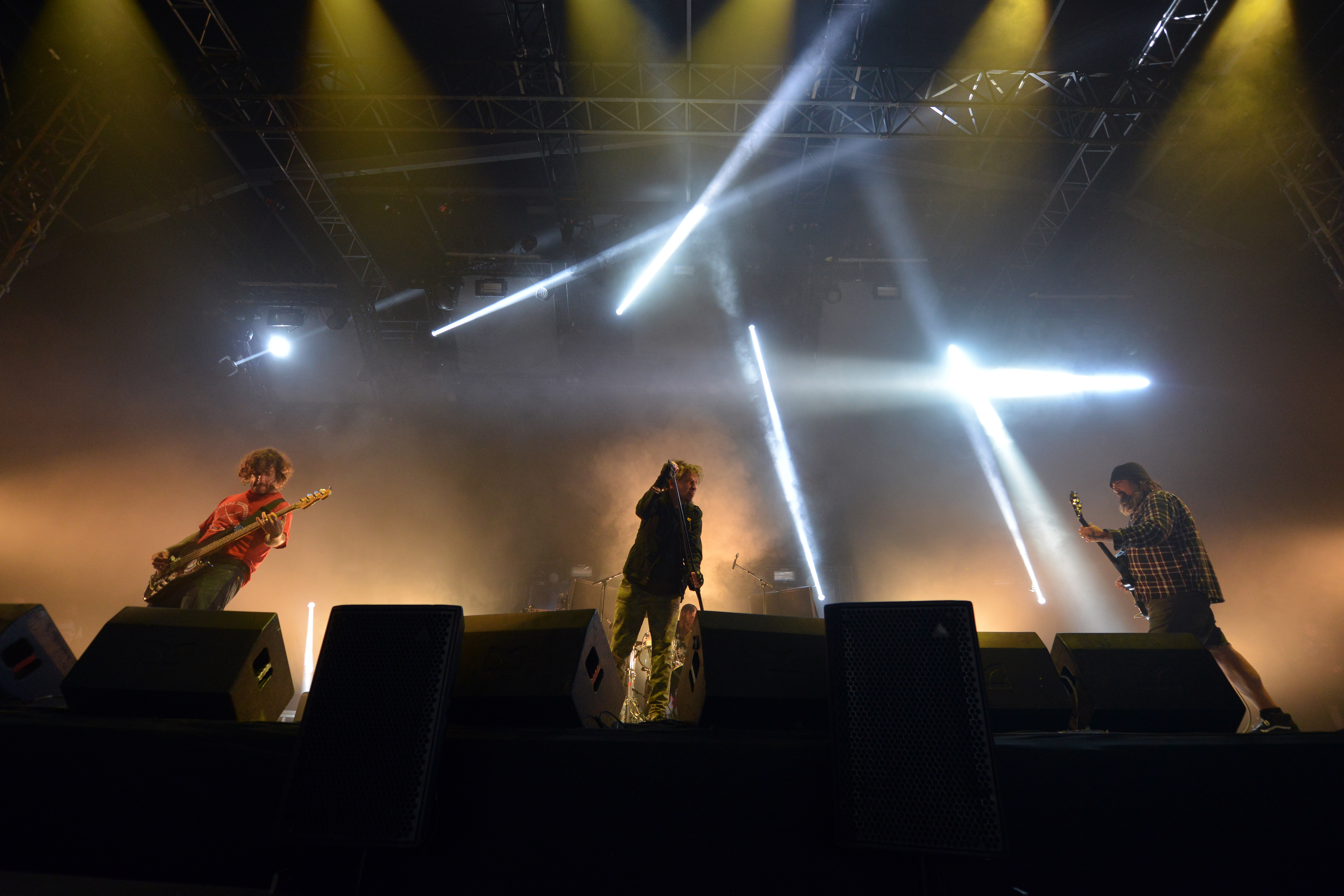 Concert du groupe américain EyeHateGod, Hellfest 2018.